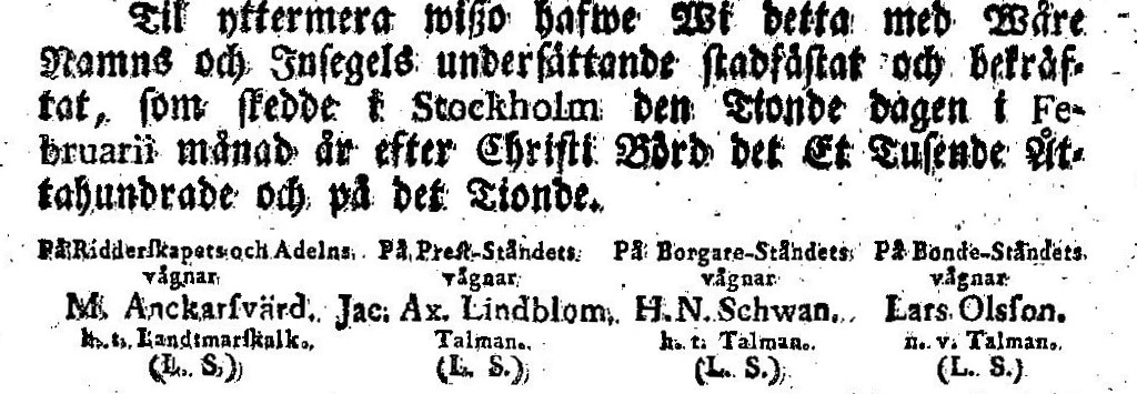 Talmännens underskrift i riksdagsordningen 1810